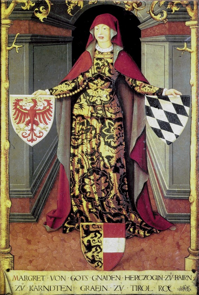 Beschreibung, Quelle Bildnis der Margarethe Maultasch aus der Ambraser Sammlung, Öl auf Leinwand, 1. Hälfte 16. Jahrhundert. Mit den Wappen von Tirol : Bayern: Kärnten